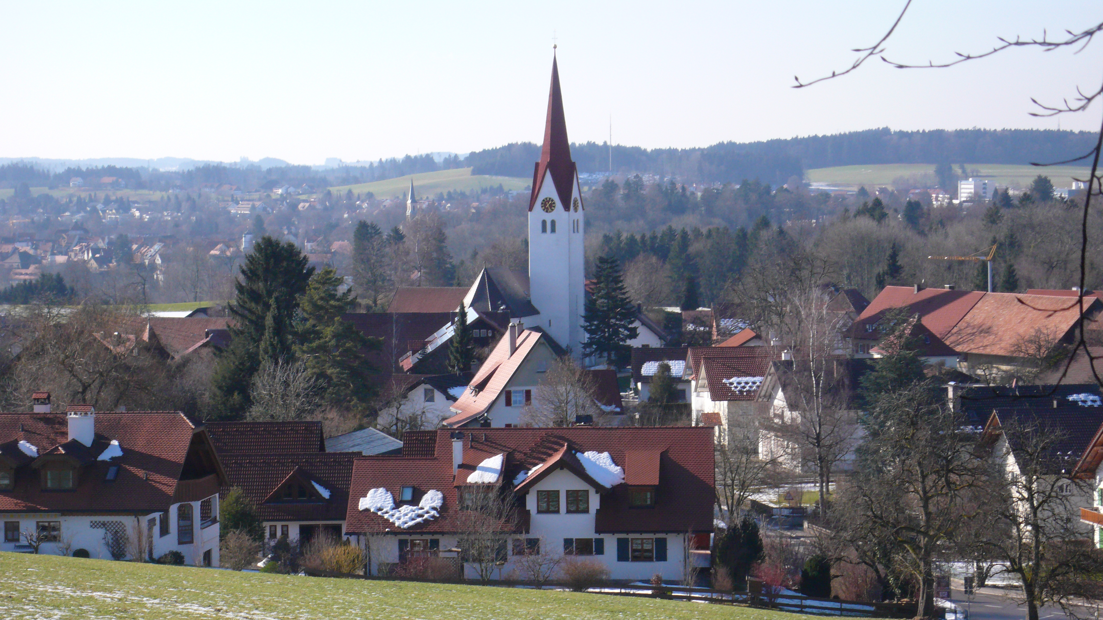 Deuchelried (Ortsteil von Wangen)